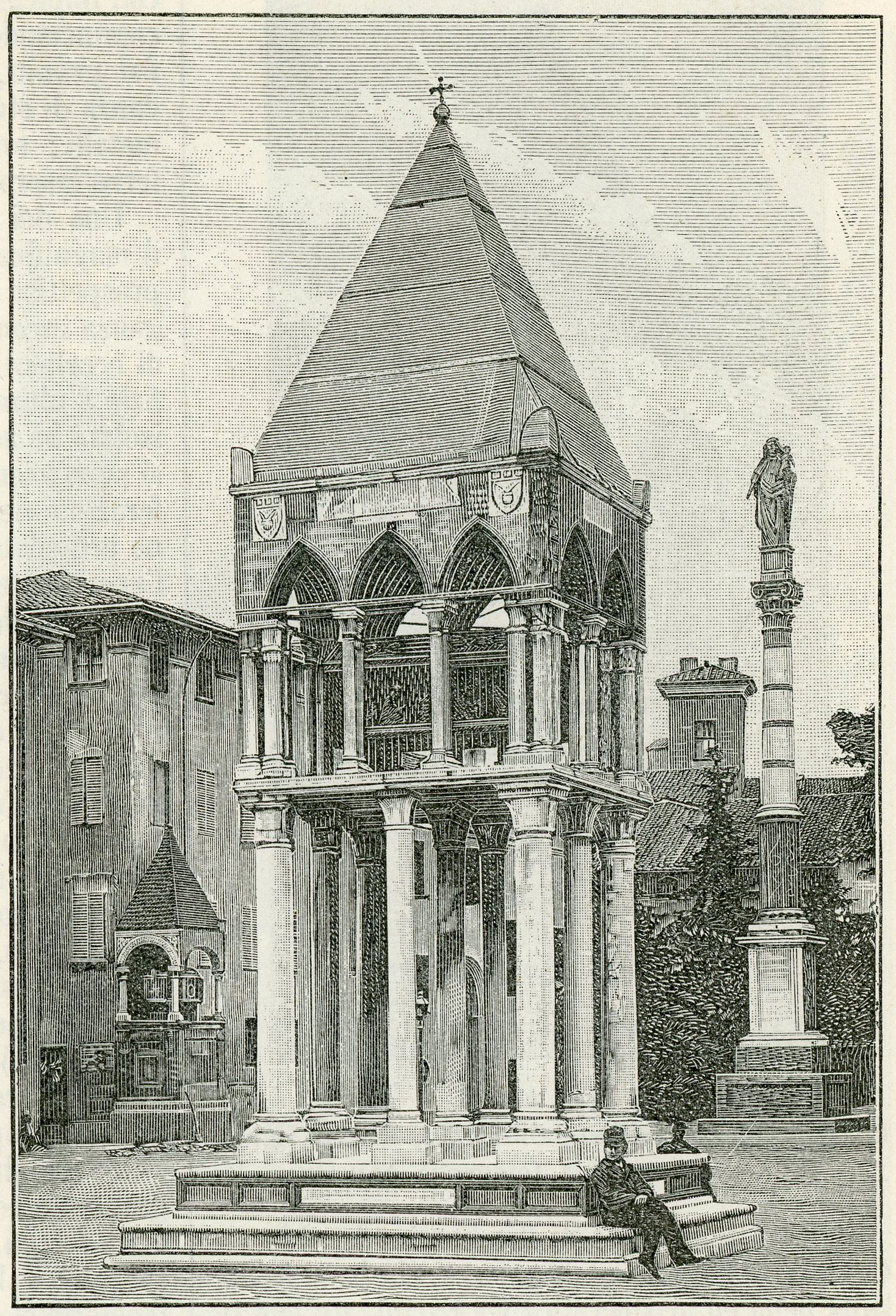 Bologna (Piazza Galileo Galilei): monumento sepolcrale di Rolandino de’ Passeggeri, primo proconsole della Università dei Notai (xilografia).